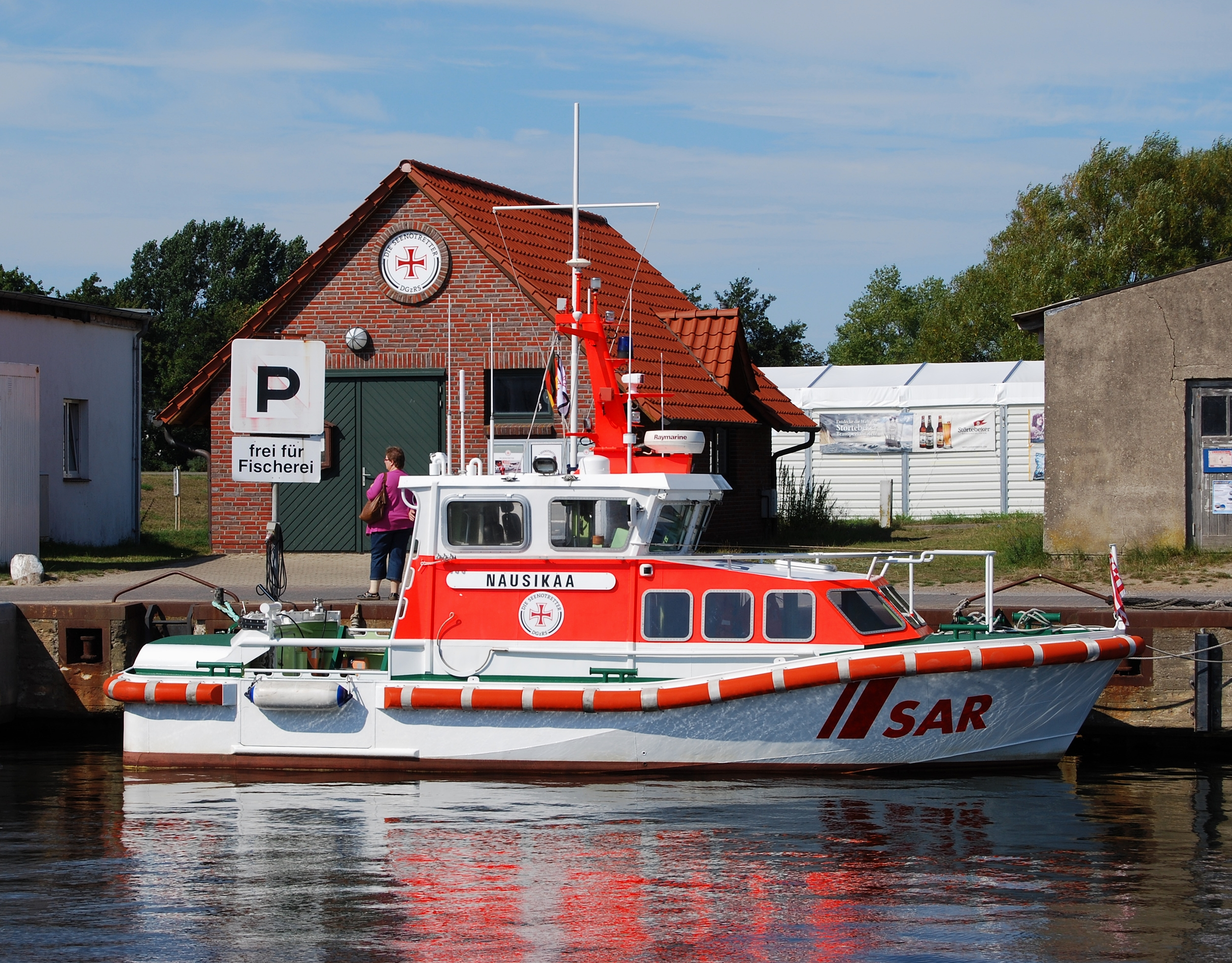 Das Seenotrettungsboot Nausikaa im Hafen von Vitte auf der Insel Hiddensee, Mecklenburg-Vorpommern.